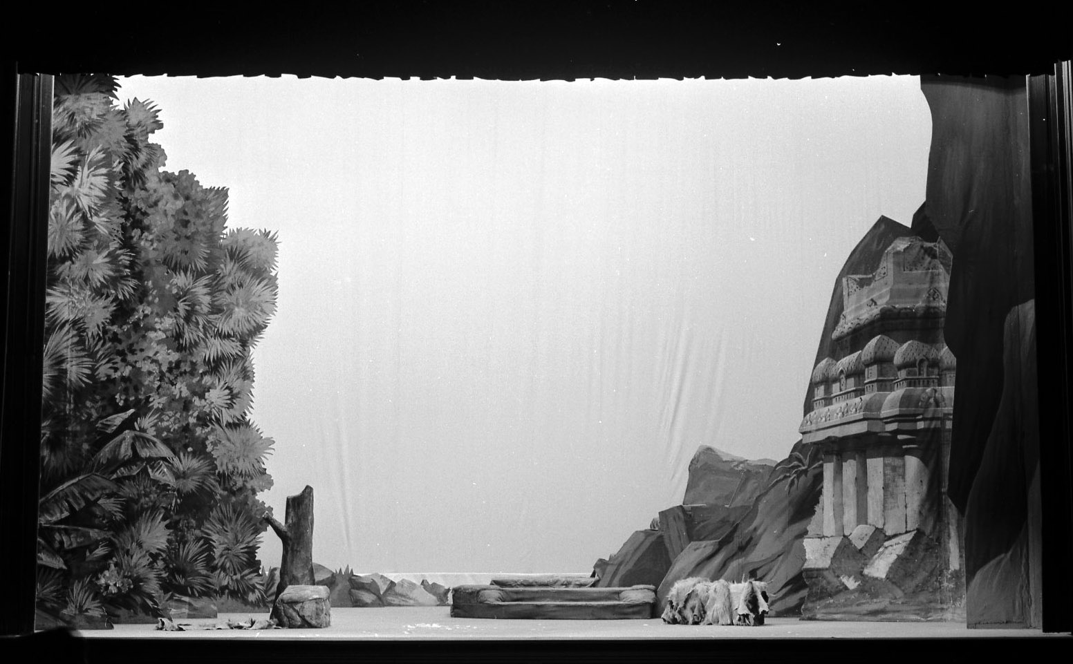 Théâtre du Capitole. Le 1 Mars 1968. Vue des décors des Pêcheurs de perles au théâtre du Capitole.